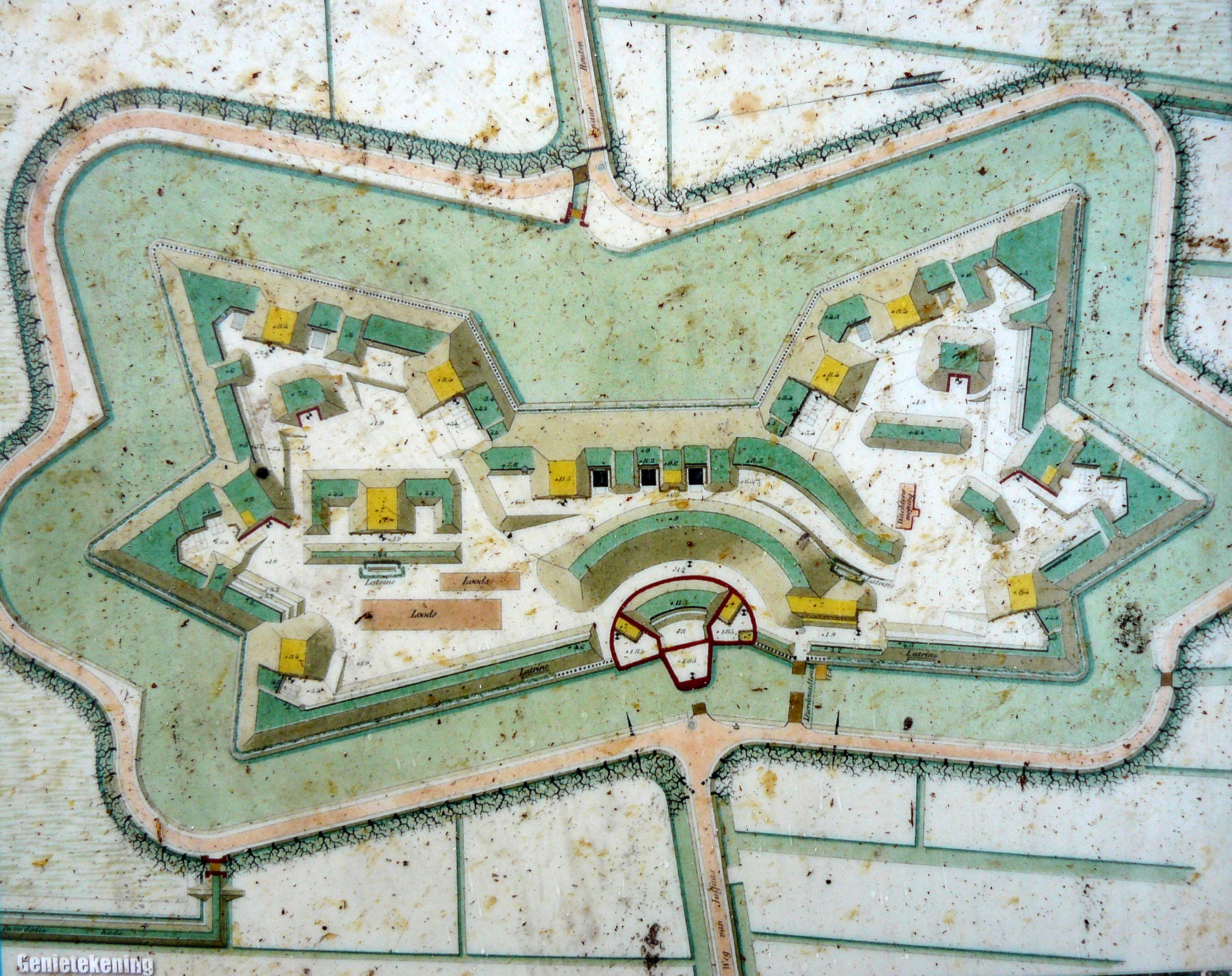 De plattegrond staat op het informatiebord bij de ingang van het fort.